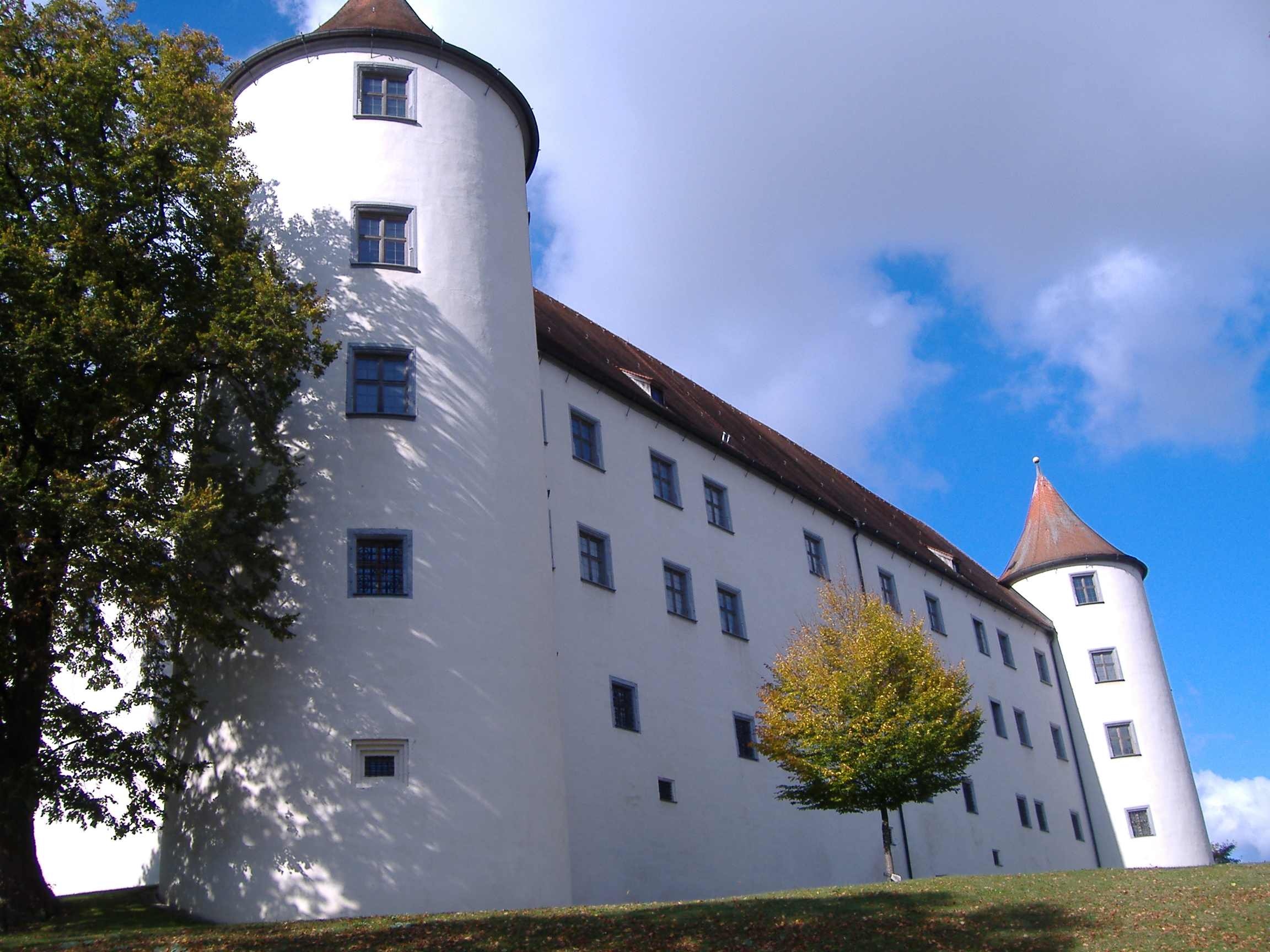 Höchstädt